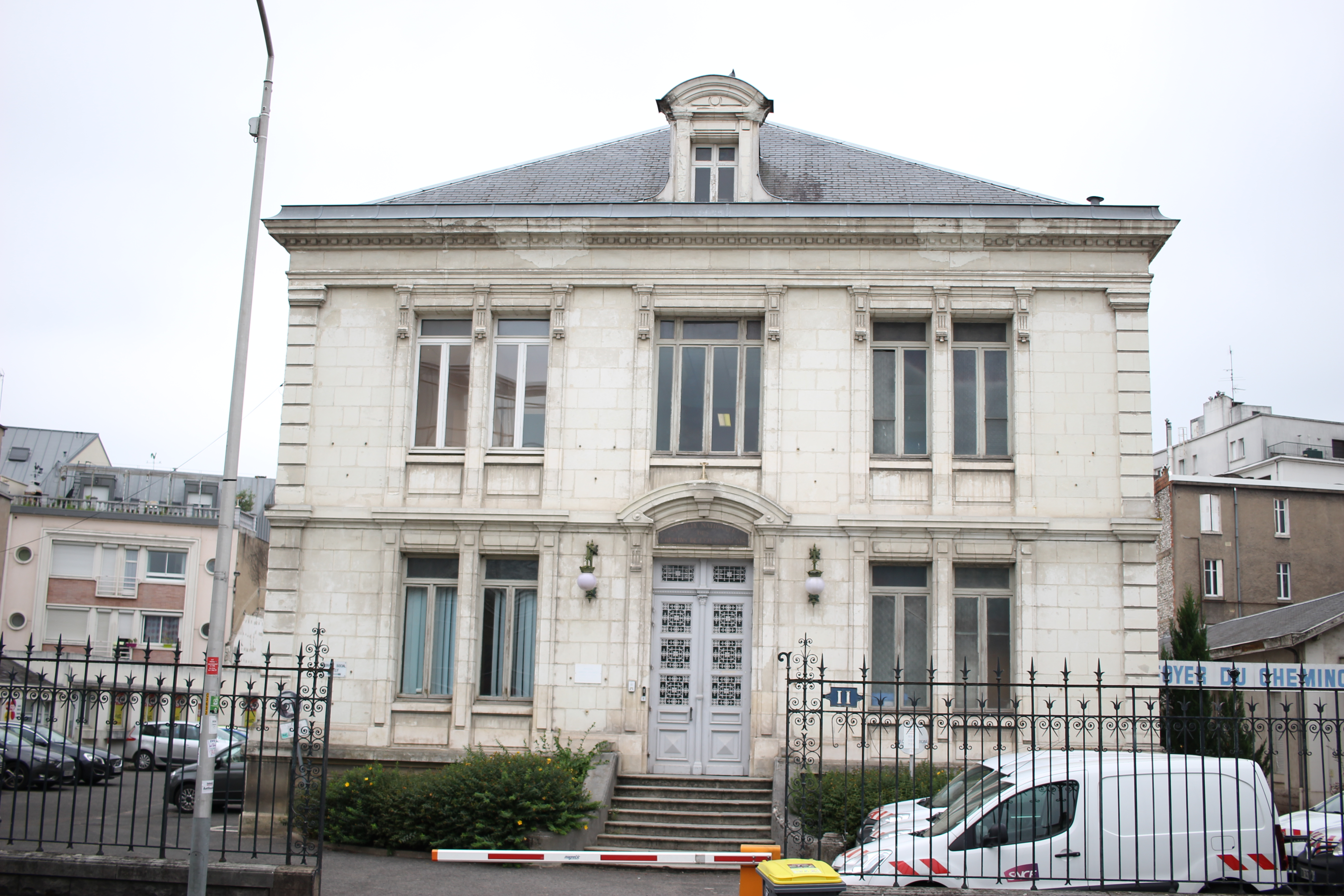 Foyer cheminots à Tours, rue Blaise Pascal, 2017